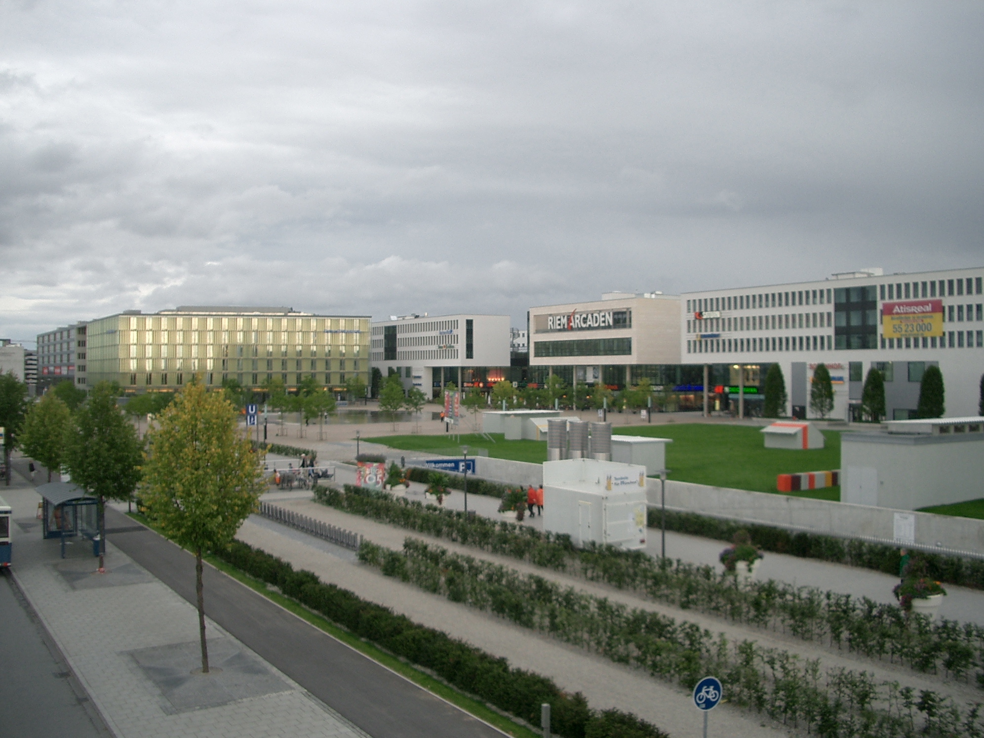 Willy-Brandt-Platz, Messestadt Riem, Riem-Arkaden, München